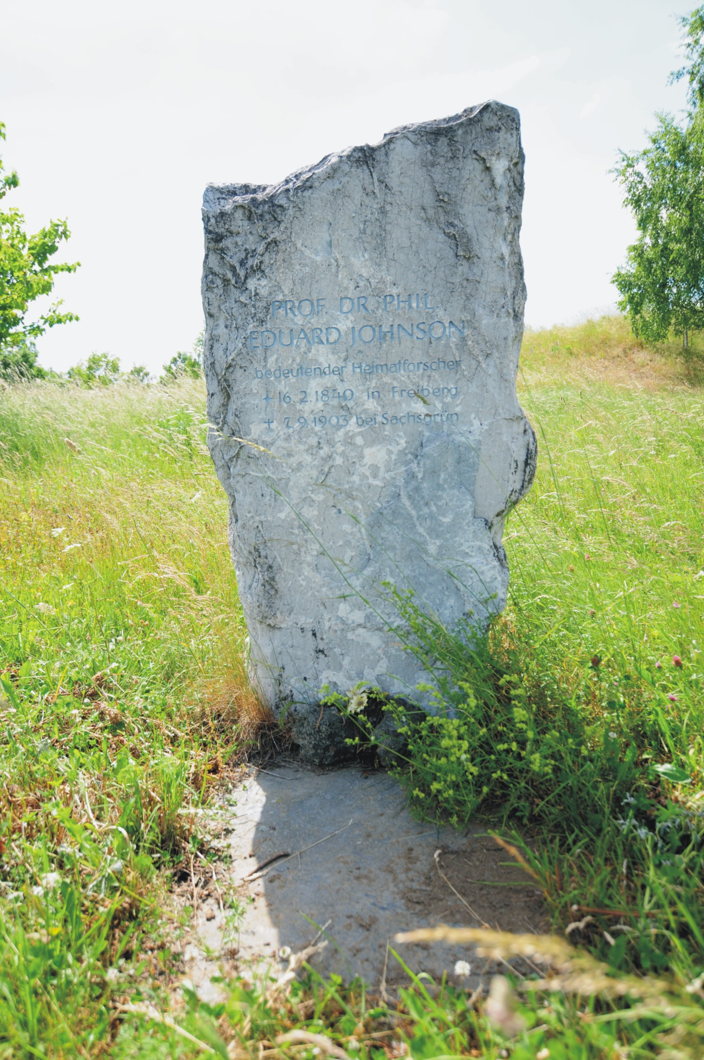 Sachsgrün, Gemeinde Triebel / Vogtland, Gedenkstein für Eduard Johnson (Deutschland, Sachsen)